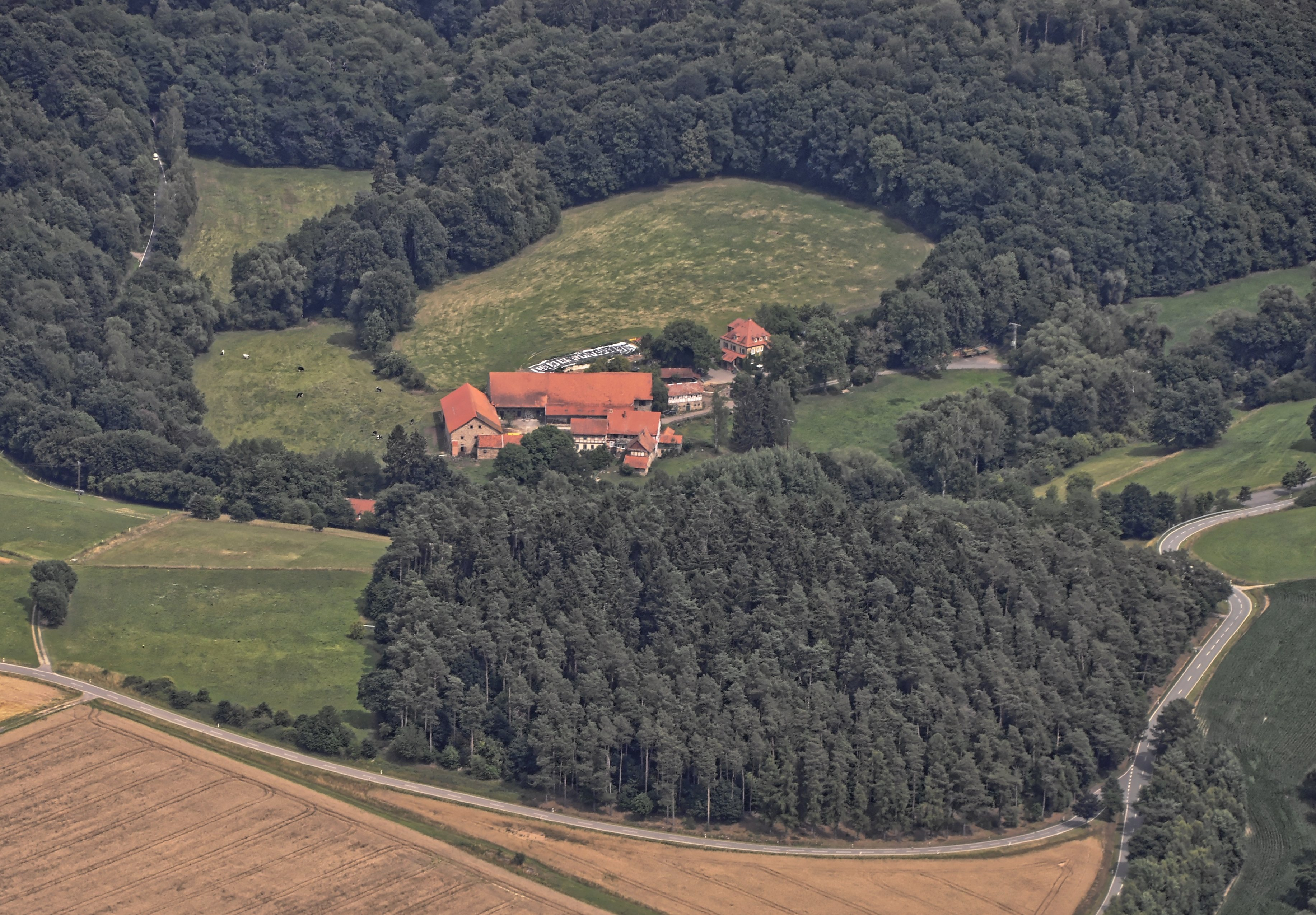 Bilder vom Flug Nordholz Hammelburg 2015: Der Reiterhof Landhaus Rote Mühle bei Niederbeisheim, Knüllwald.